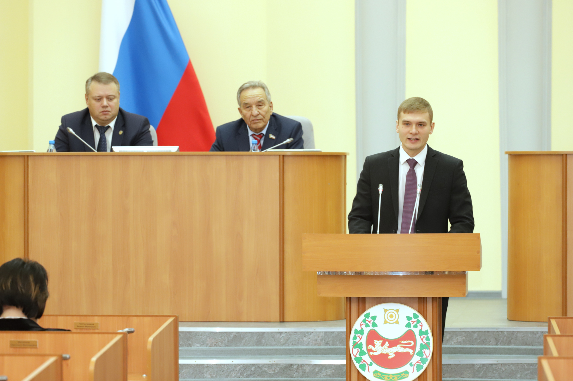 Церемония вступления в должность Главы Республики Хакасия Валентина Коновалова